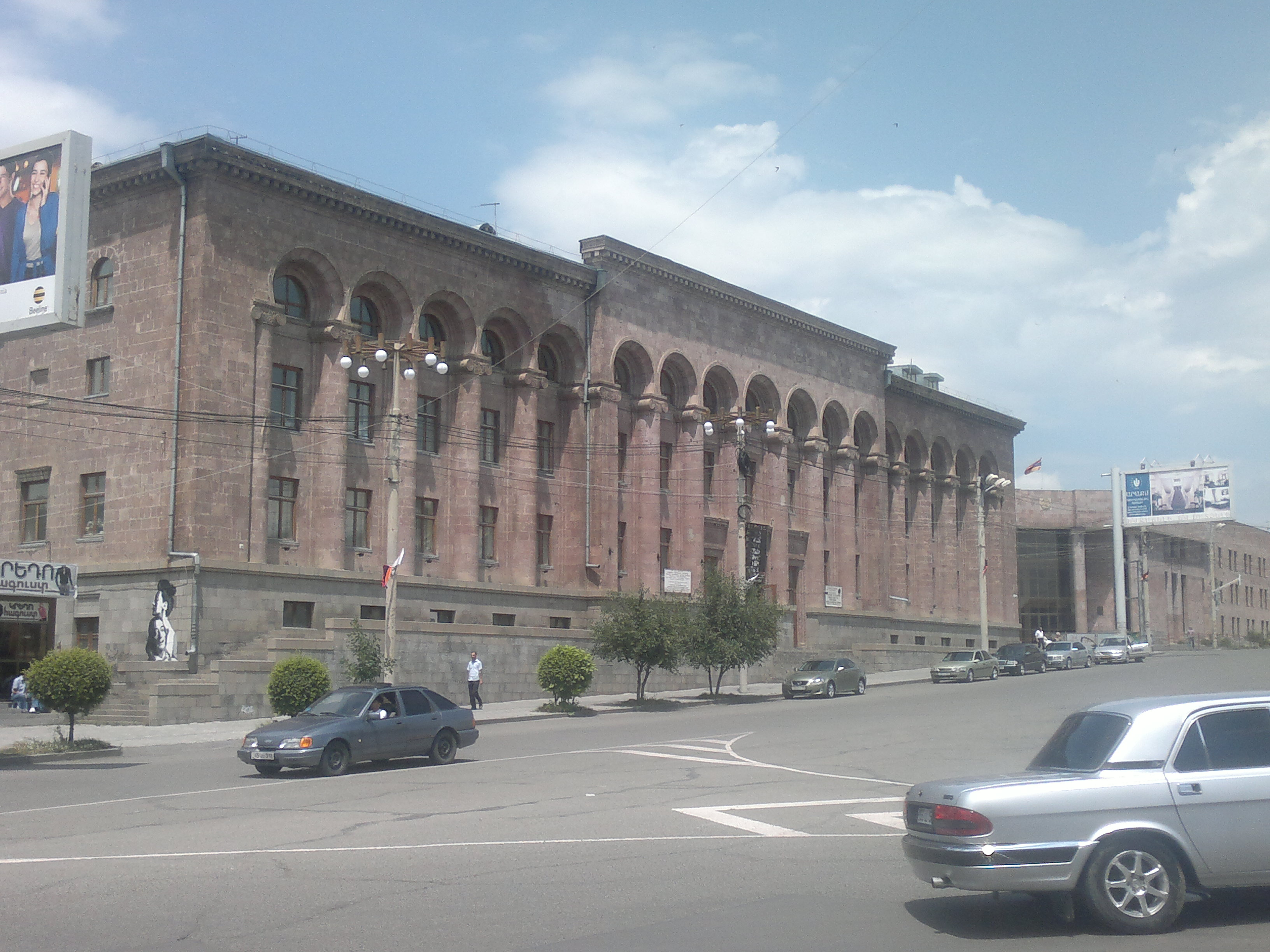 Գյումրու արվեստների ակադեմիան